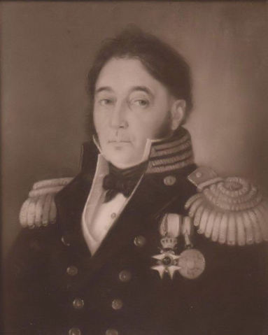 Porträtt av Georg Samuel von Gegerfelt